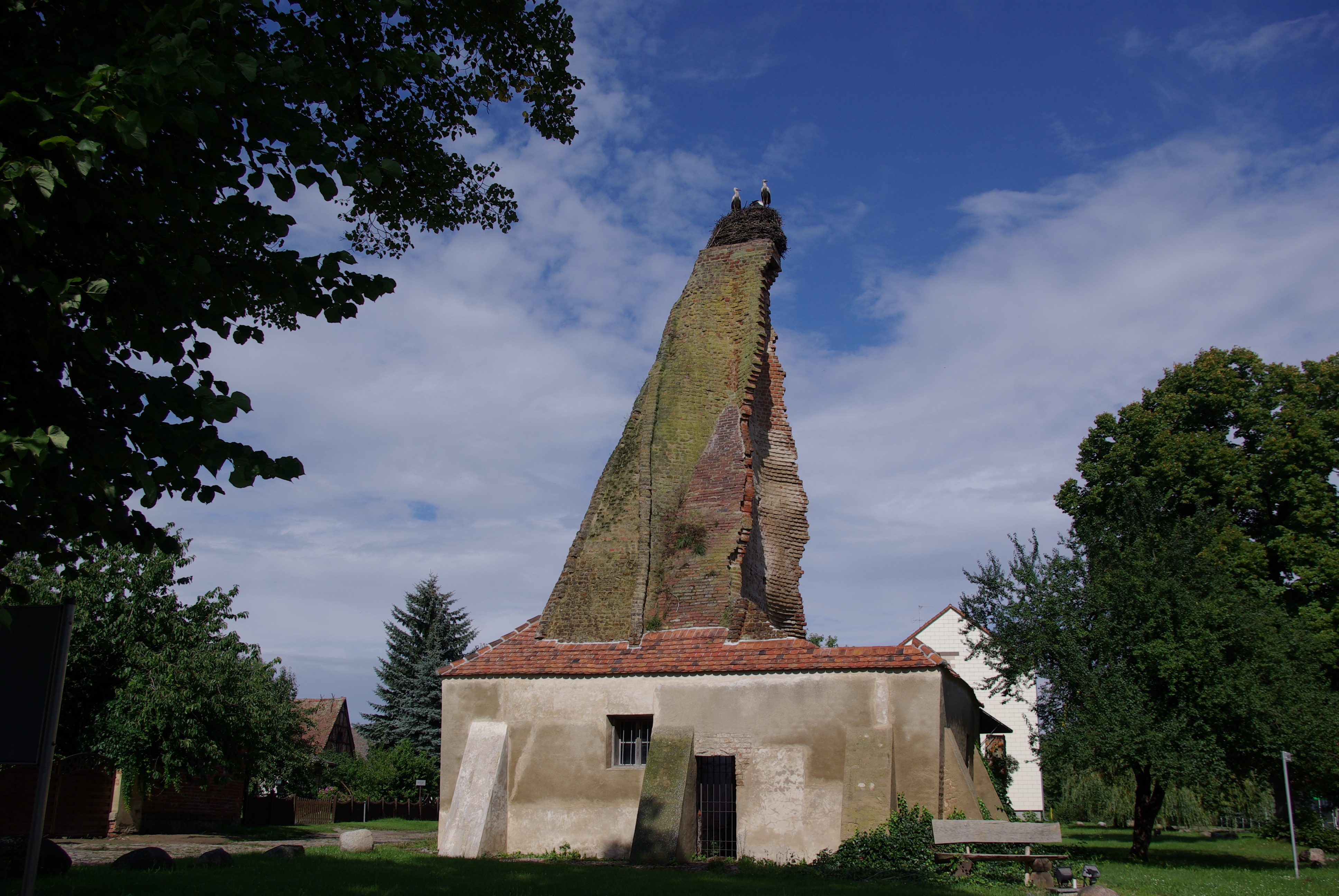 Mühlenberge in Brandenburg. Der Schwedenturm ist der Rest der Küche eines Guthauses. Der Schwedenturm steht unter Denkmalschutz. Auf dem Turm brüten Störche.